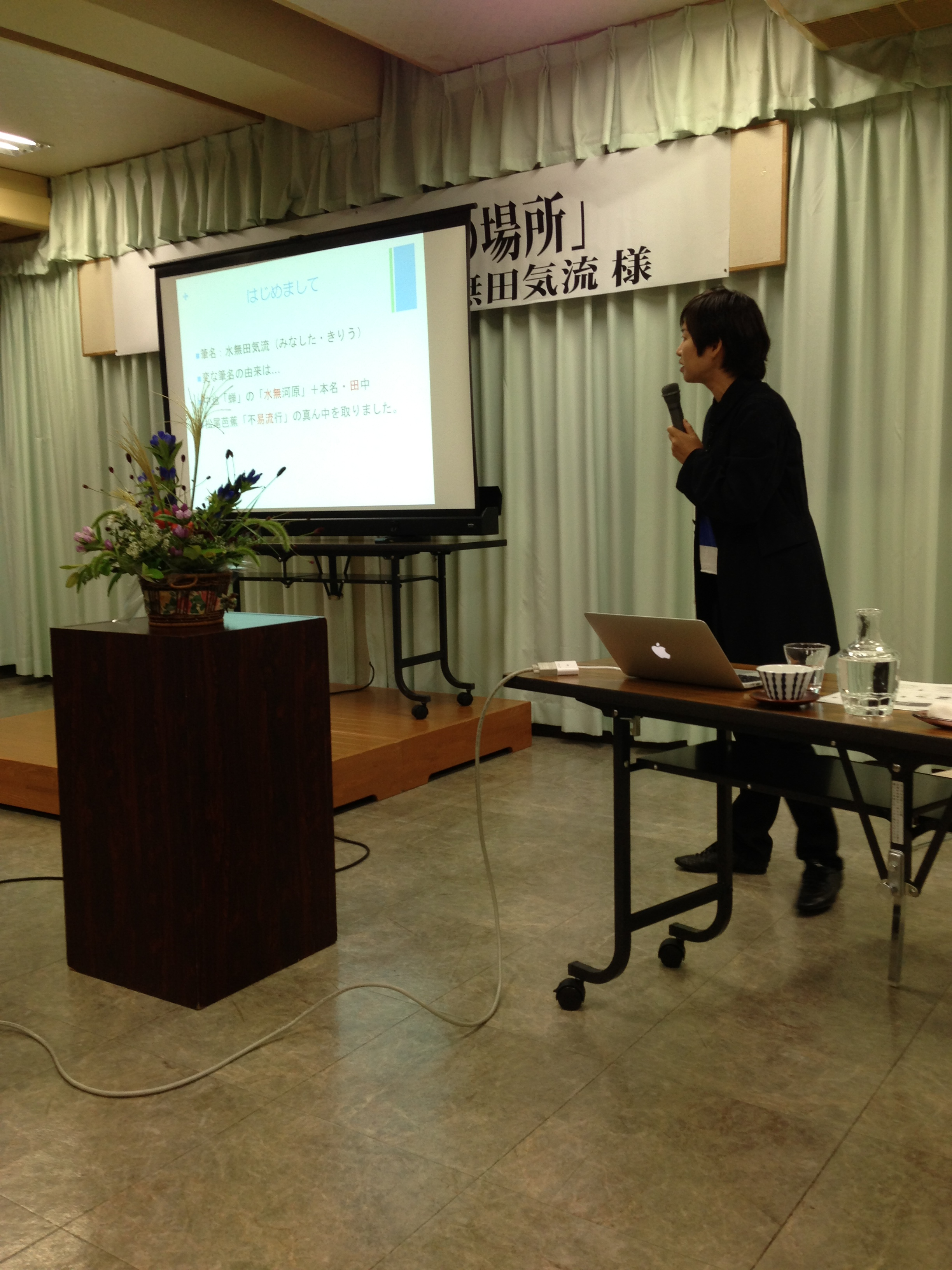 水無田 気流